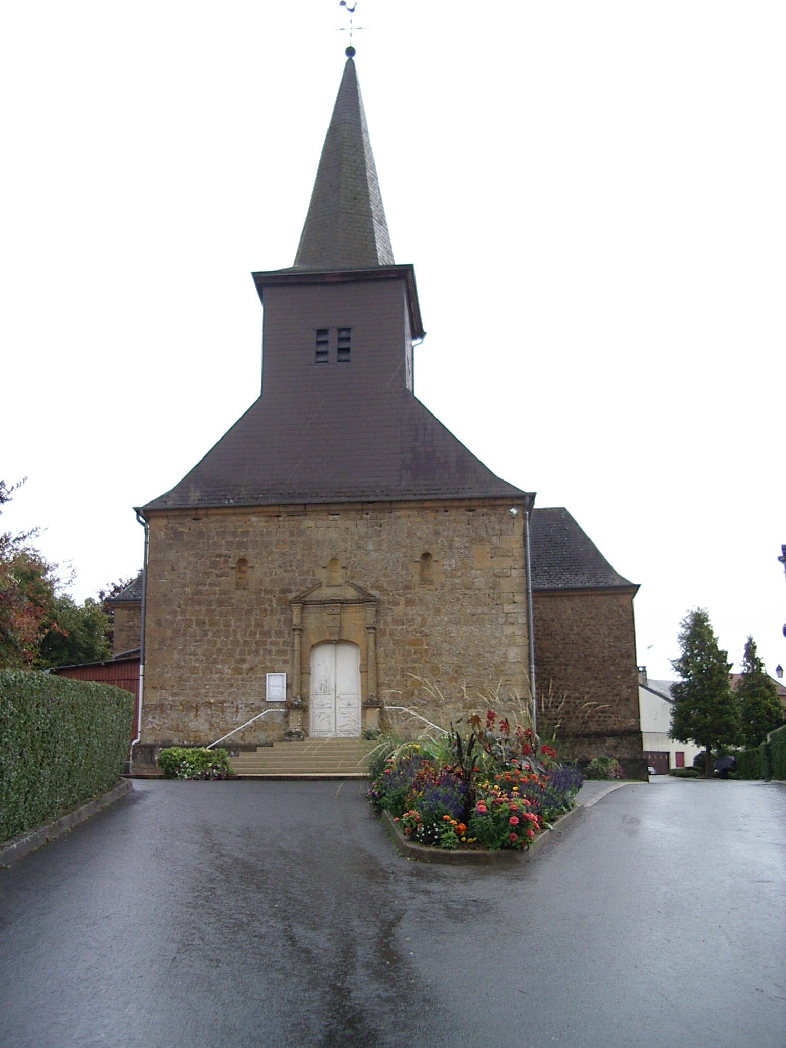 Eglise Saint-Brice est située à Lumes dans le departement des ardennes en France